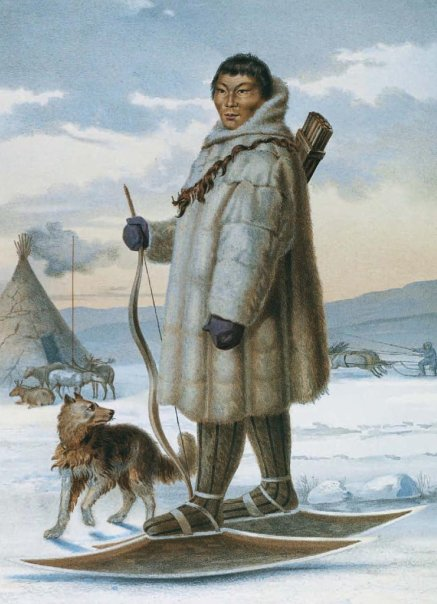 Юрак (Ненец)